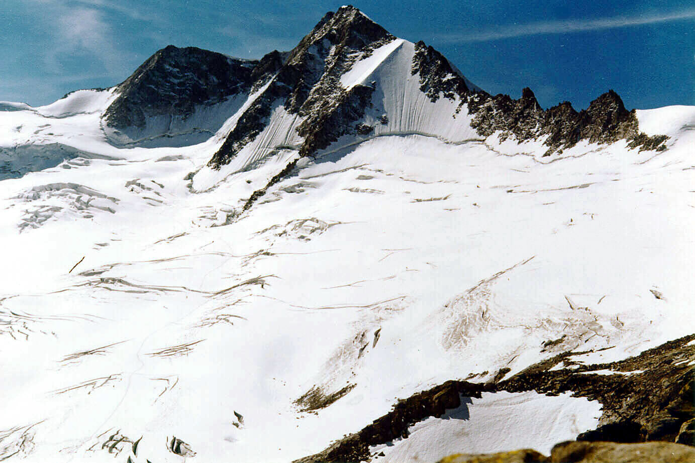 Großer Möseler mit Waxeggkees 1980, Zillertaler Alpen, Österreich/Italien